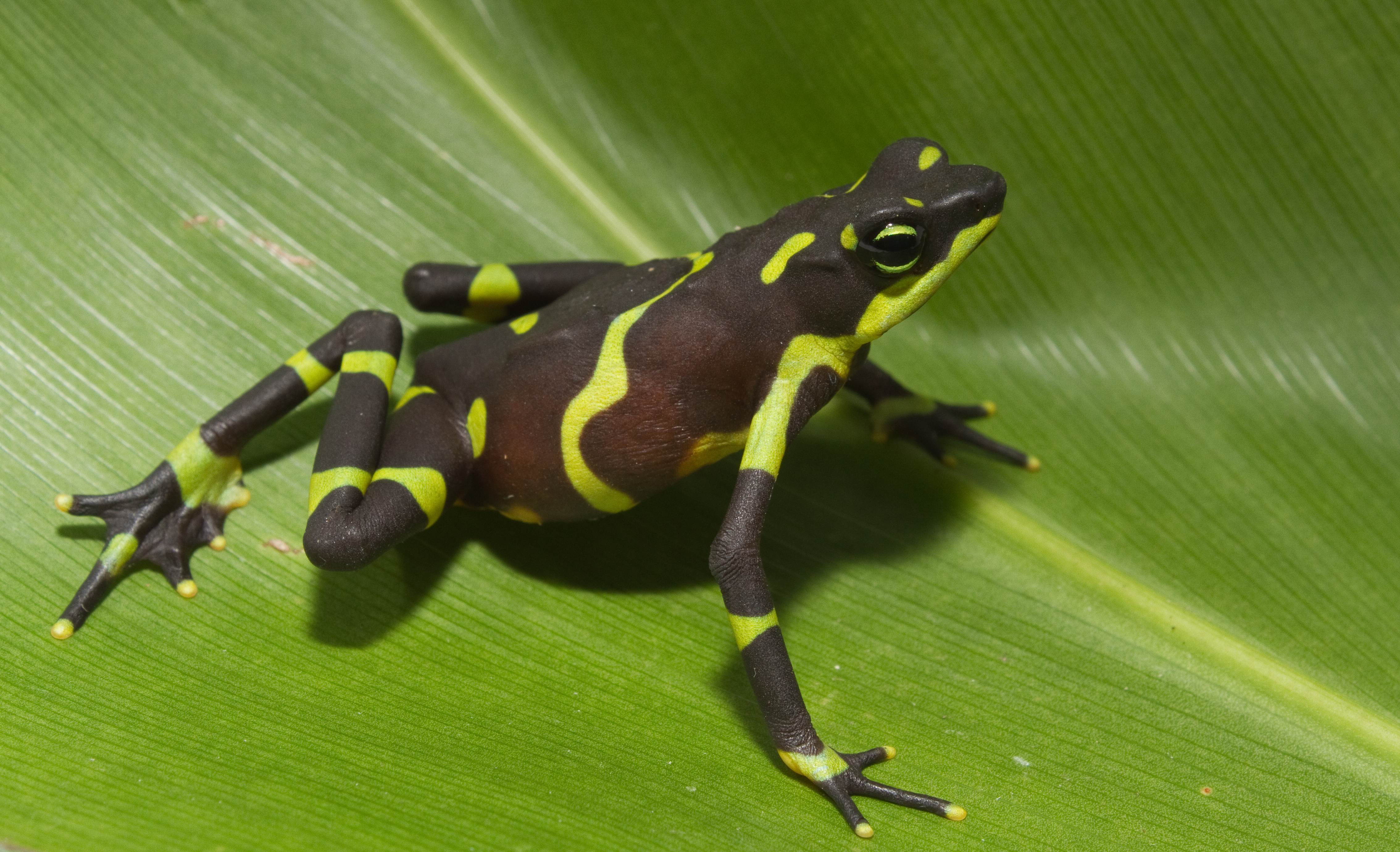 Atelopus limosus